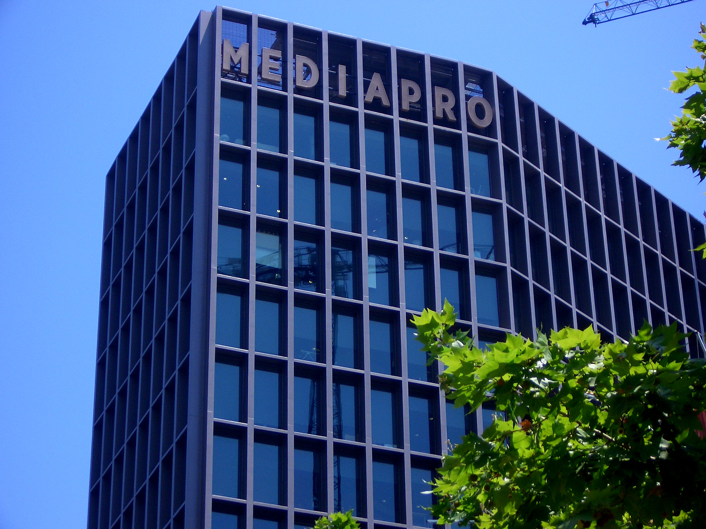 Seu d'IMAGINA Centre Audiovisual (Mediapro) a l'Avinguda Diagonal de Barcelona